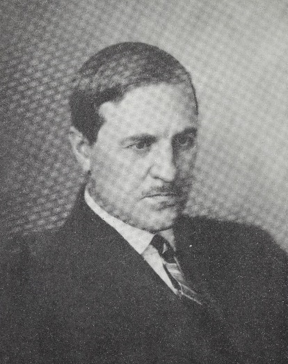 Arnstein Arneberg i 1919. Gjengitt i «Rådhuset i Oslo D.1: Historikk», s. 112.